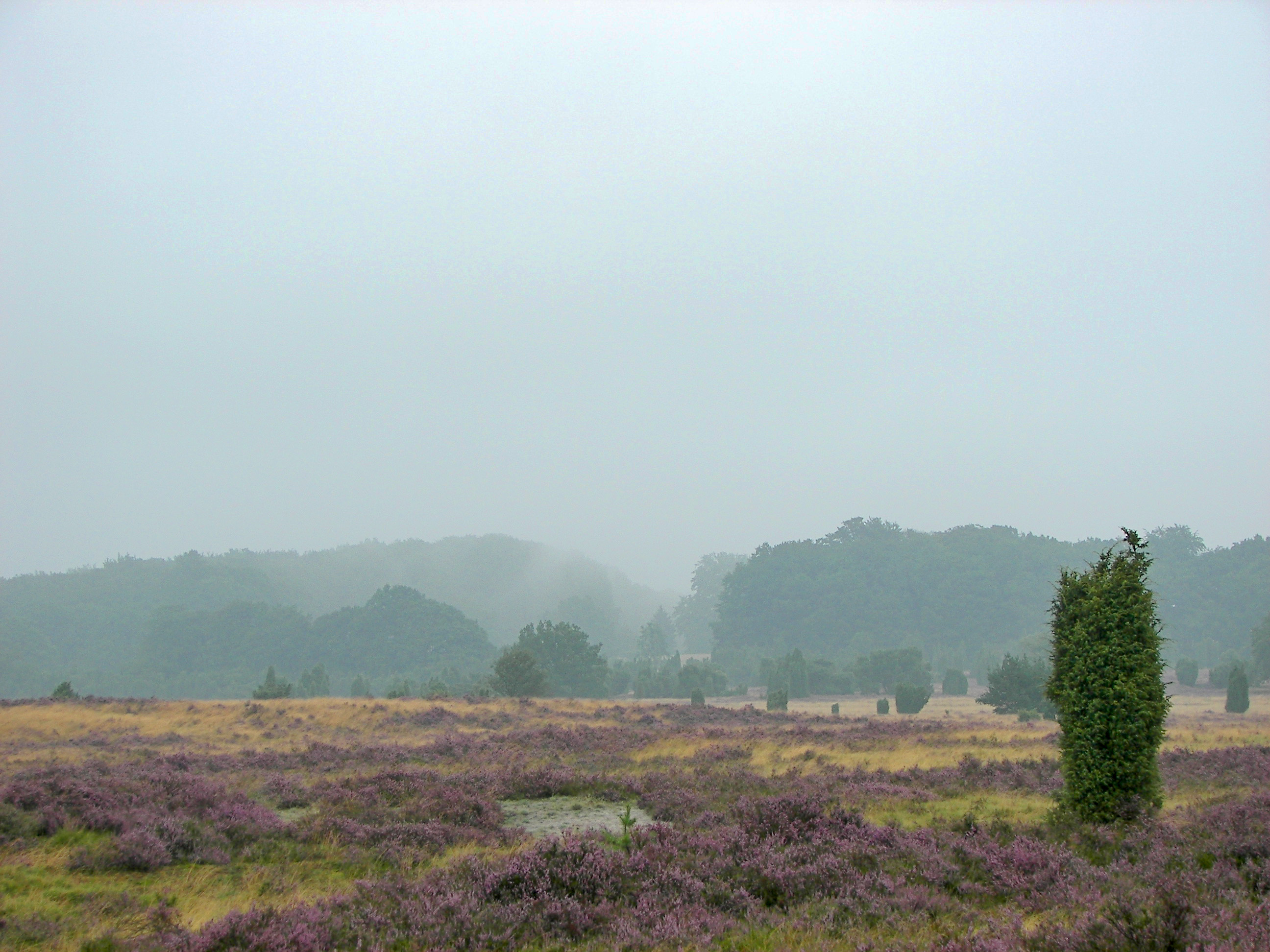 Lüneburger Heide bei Niederhaverbeck